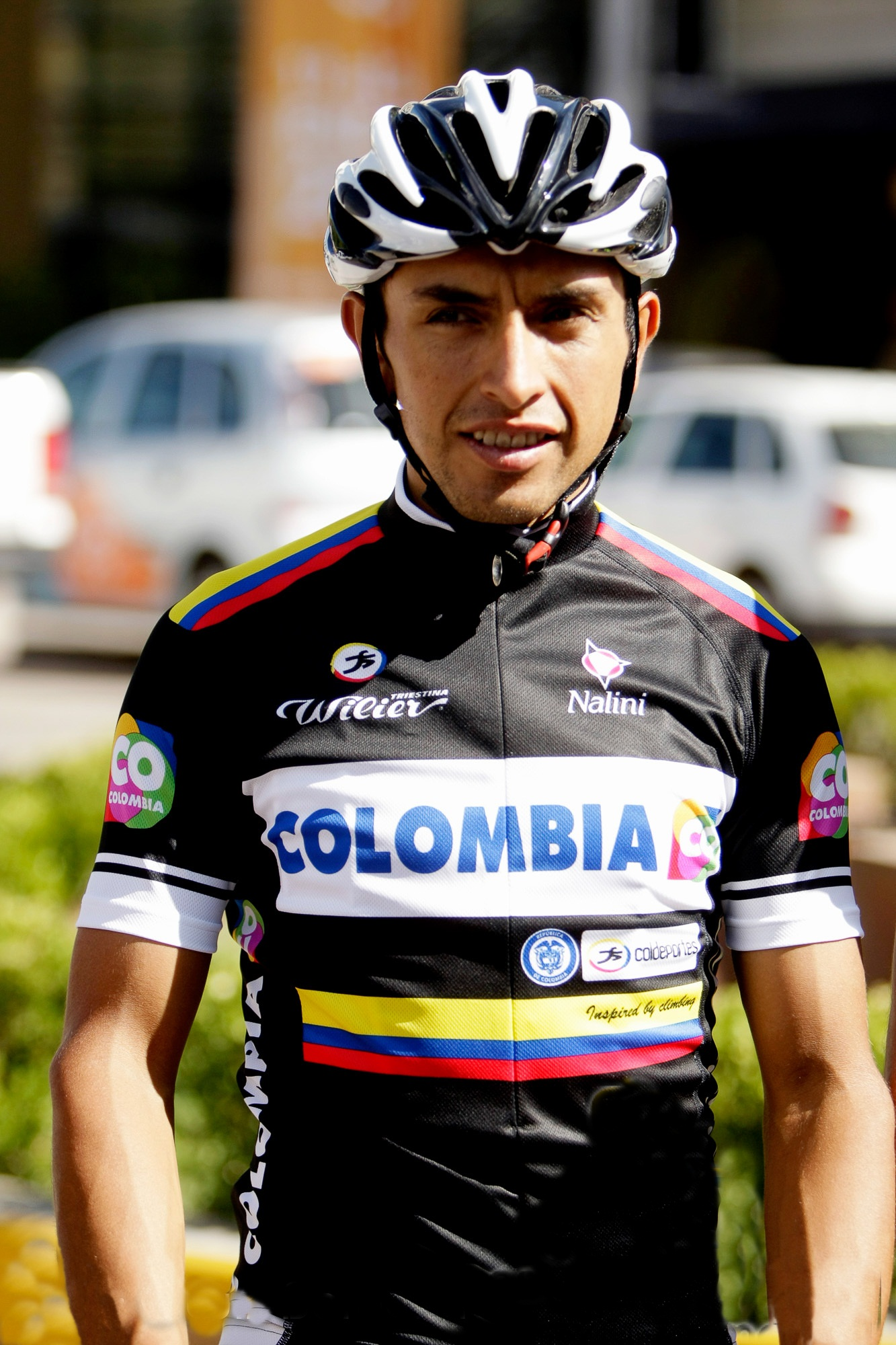 Miguel Ángel Rubiano con el maillot del Team Colombia en 2014